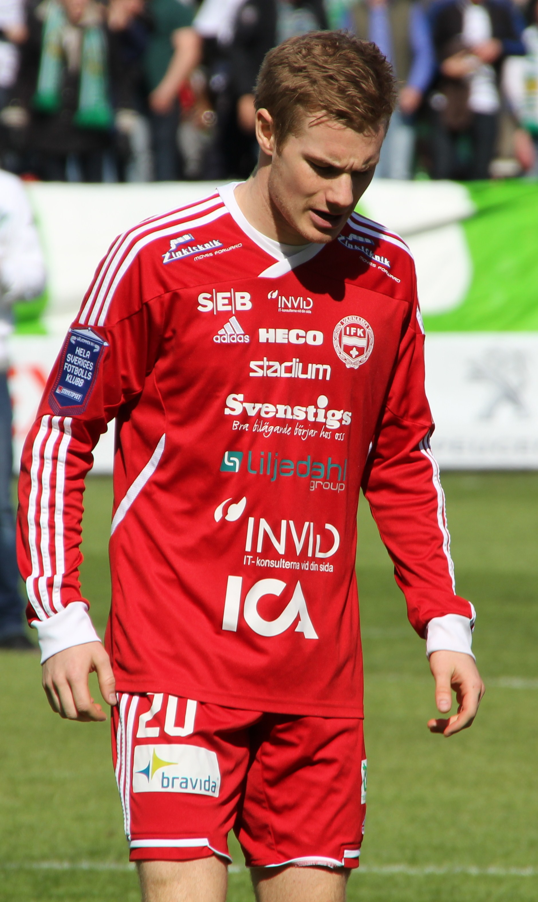 IFK Värnamos Freddy Winsth.